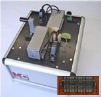 MCA-ST Steckeradapter